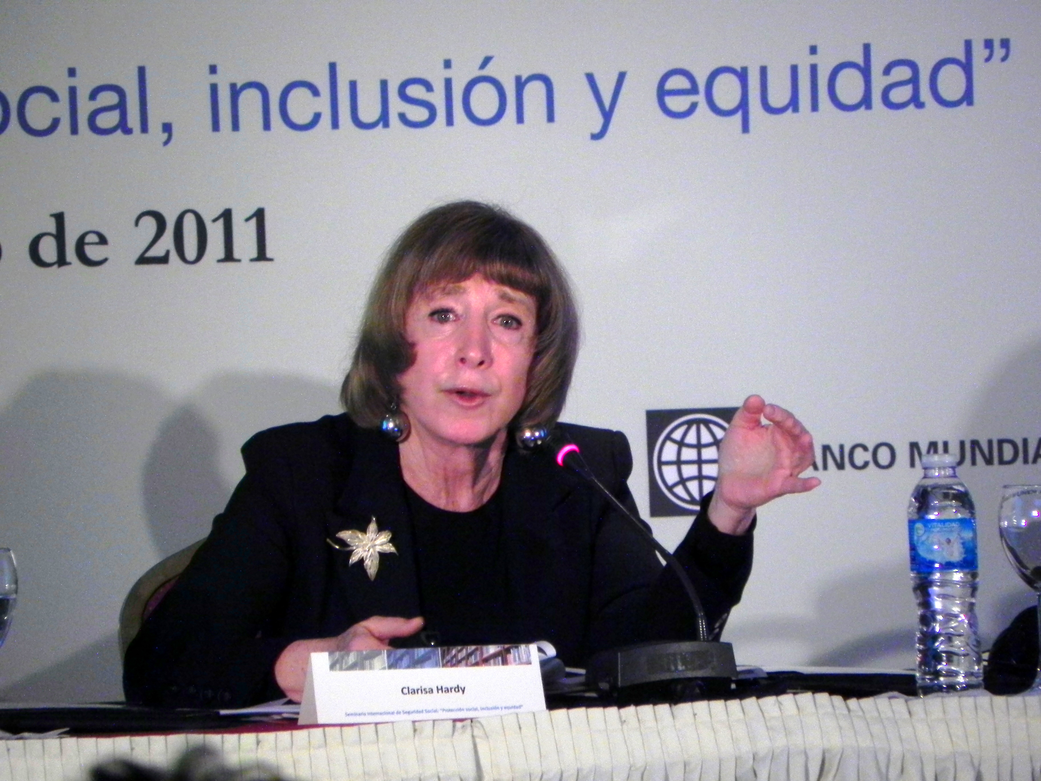 El seminario internacional de Seguridad Social “Protección social, inclusión y equidad” es el ámbito para la discusión de políticas relacionadas con la seguridad social en el mundo, compartir realidades, avances y desafíos en el área. Participan representantes de organismos internacionales en la materia (AISS, OISS, CISS, OIT y BM), así como funcionarios públicos provenientes de España, Dinamarca, Brasil, Chile, Panamá, Bolivia, Ecuador, México y El Salvador. Destacados académicos comparten sus trabajos de investigación, acercando los debates recientes y los alcances argentinos en la materia.